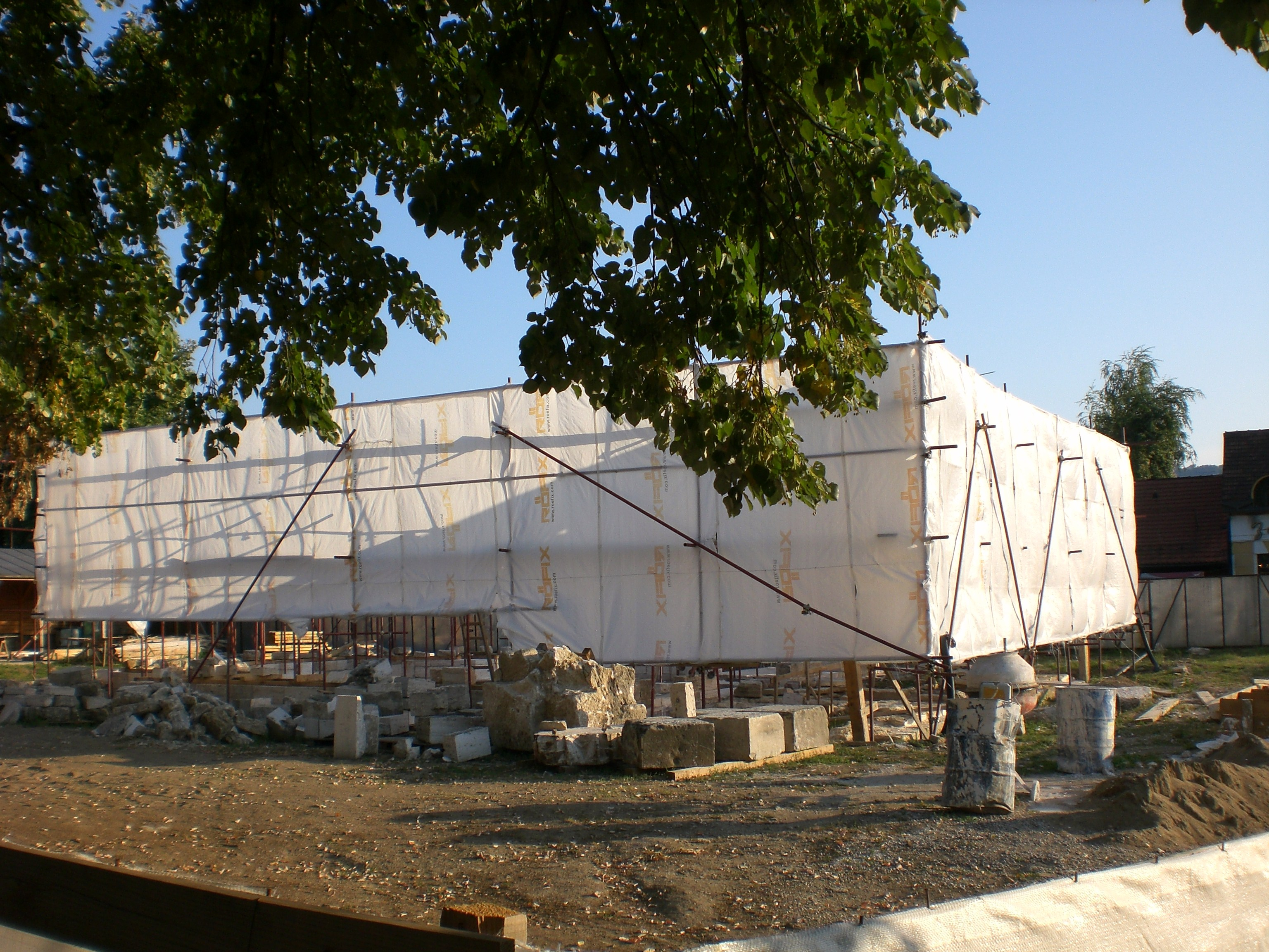 Rekonstrukcija Ferhadije na ljeto 2007. godine.